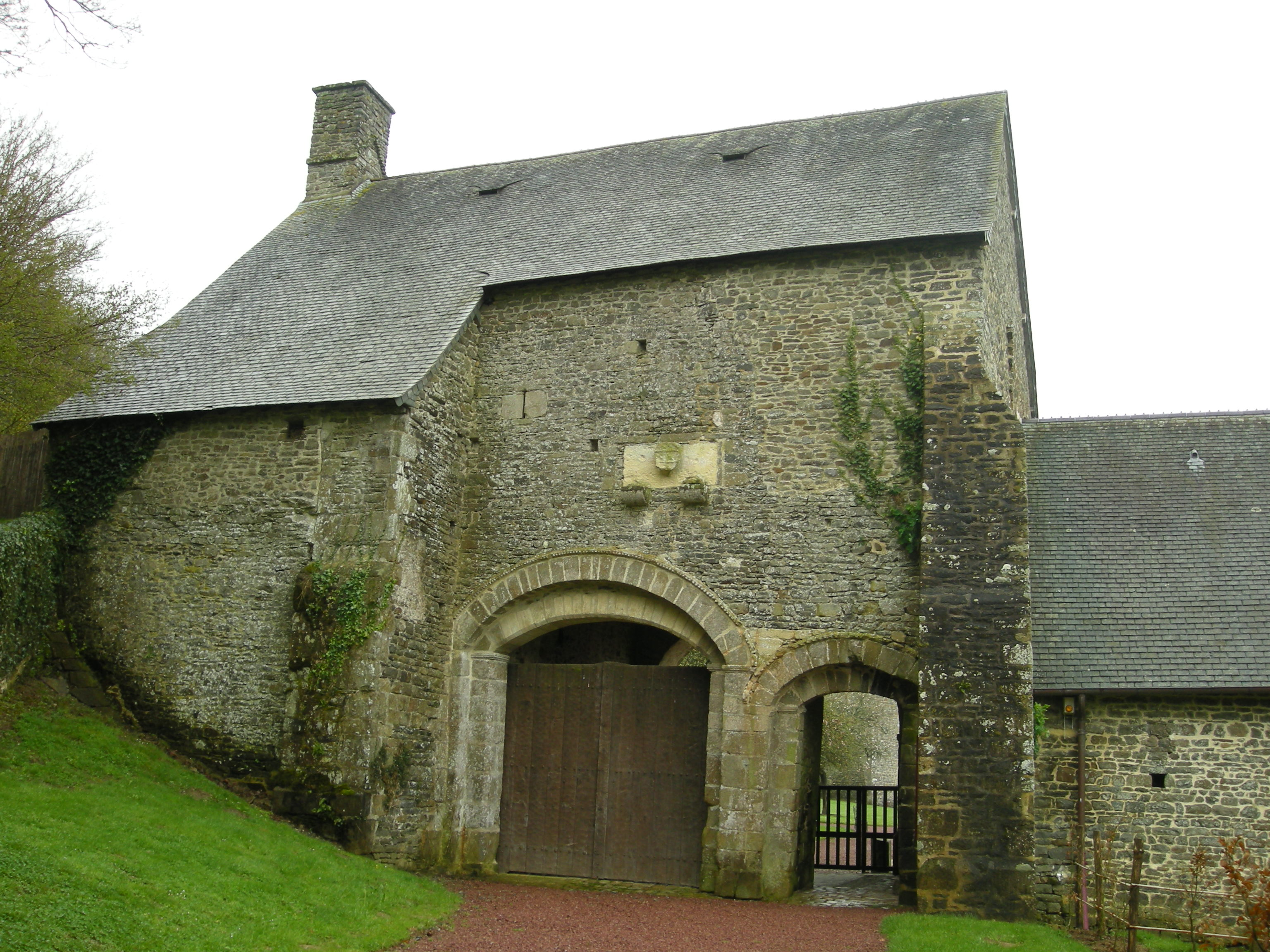 Porterie de l'abbaye de Hambye (Normandie)